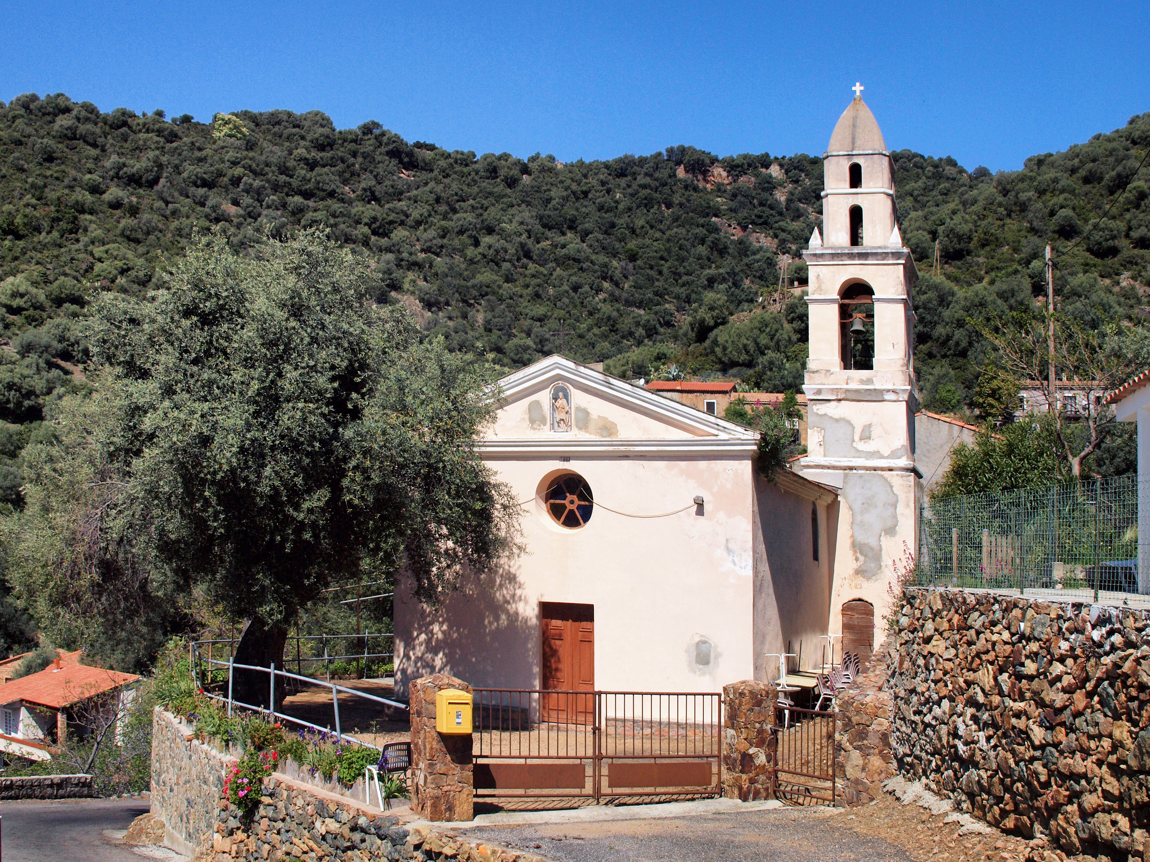 Osani, Ouest Corse - Église Saint-Jean-Baptiste au hameau de Curzo, bâtie en 1862.